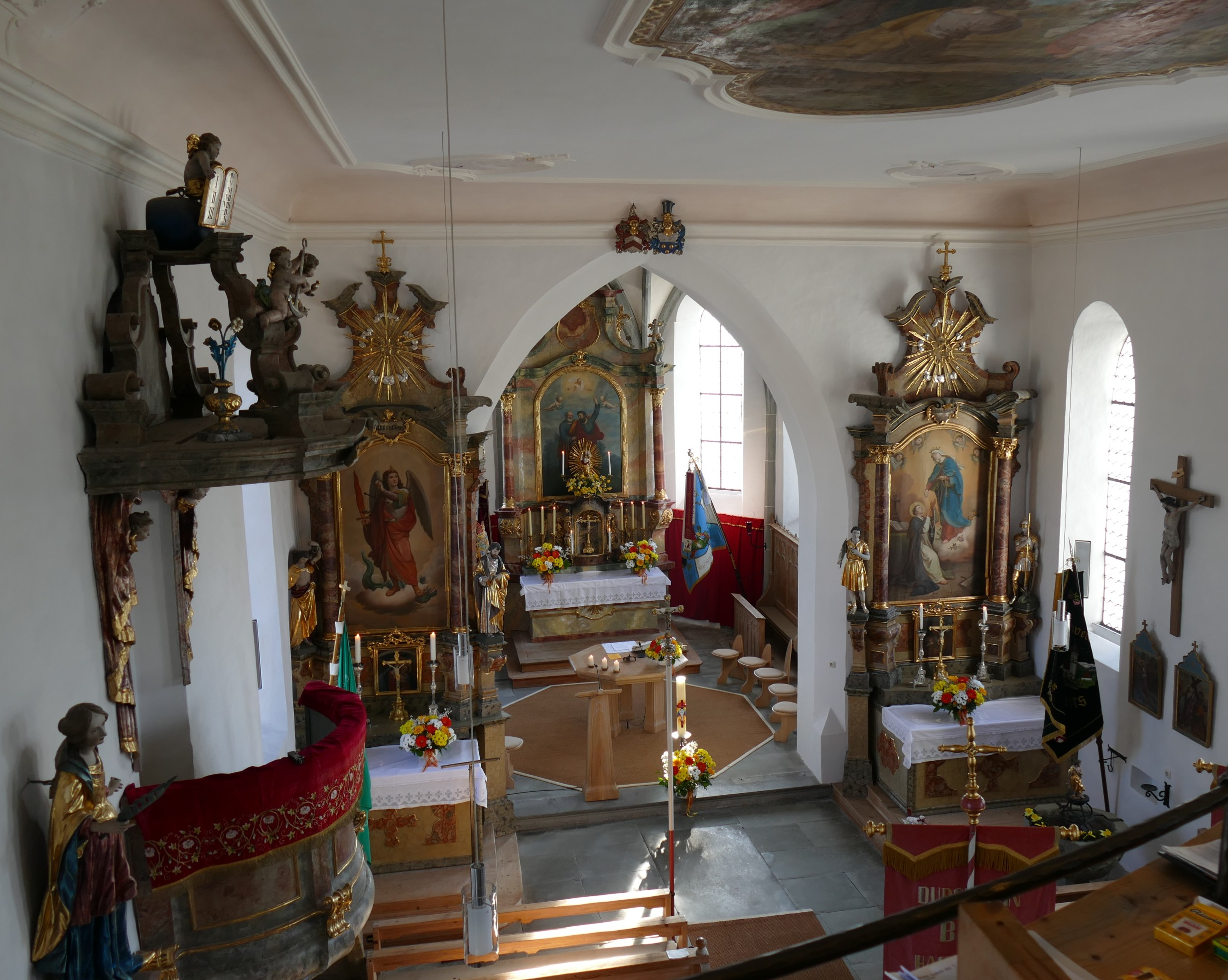 Eckharts Kirche Innenraum